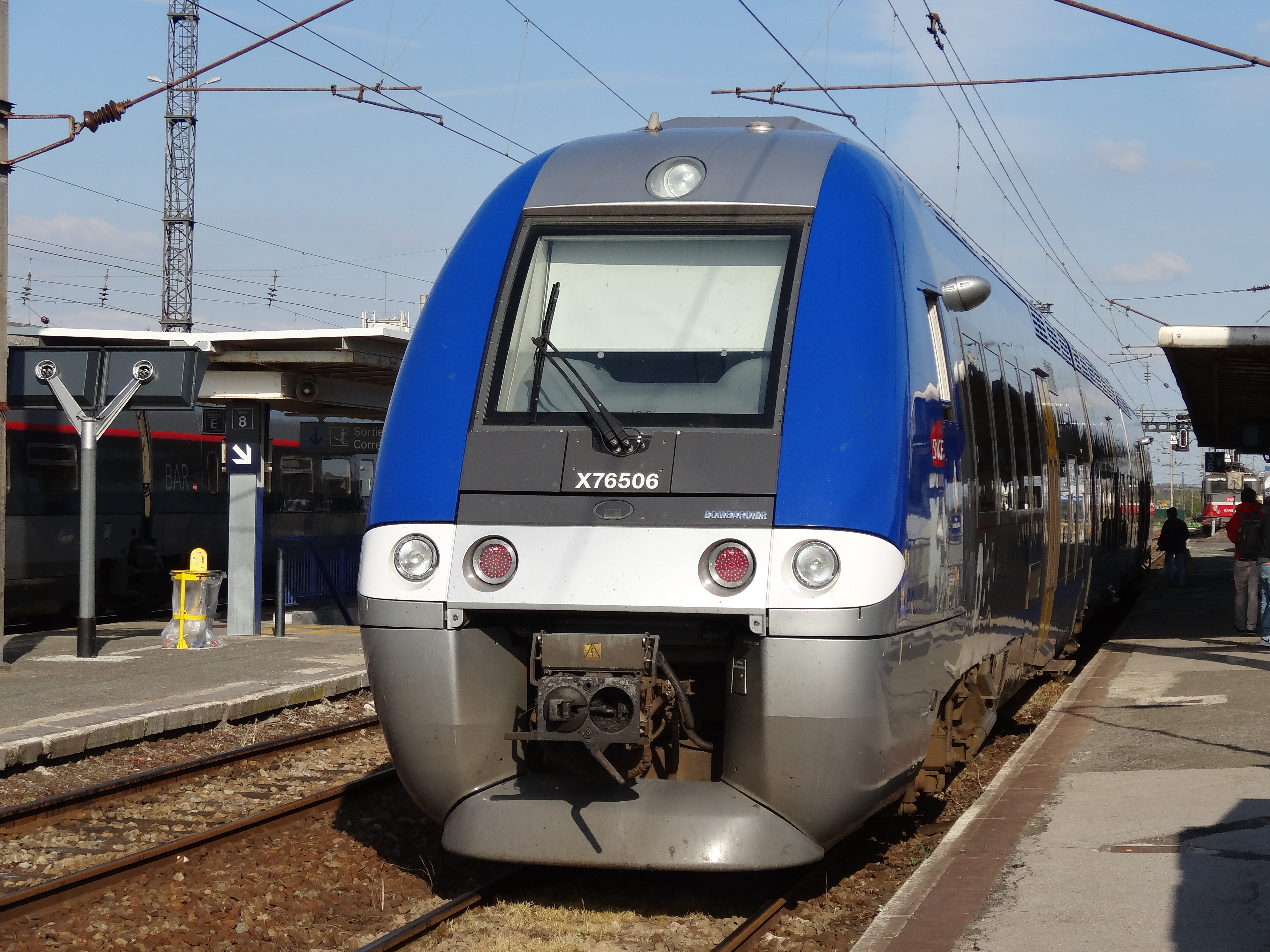 Gare d'Hazebrouck, Nord, Nord-Pas-de-Calais, France.